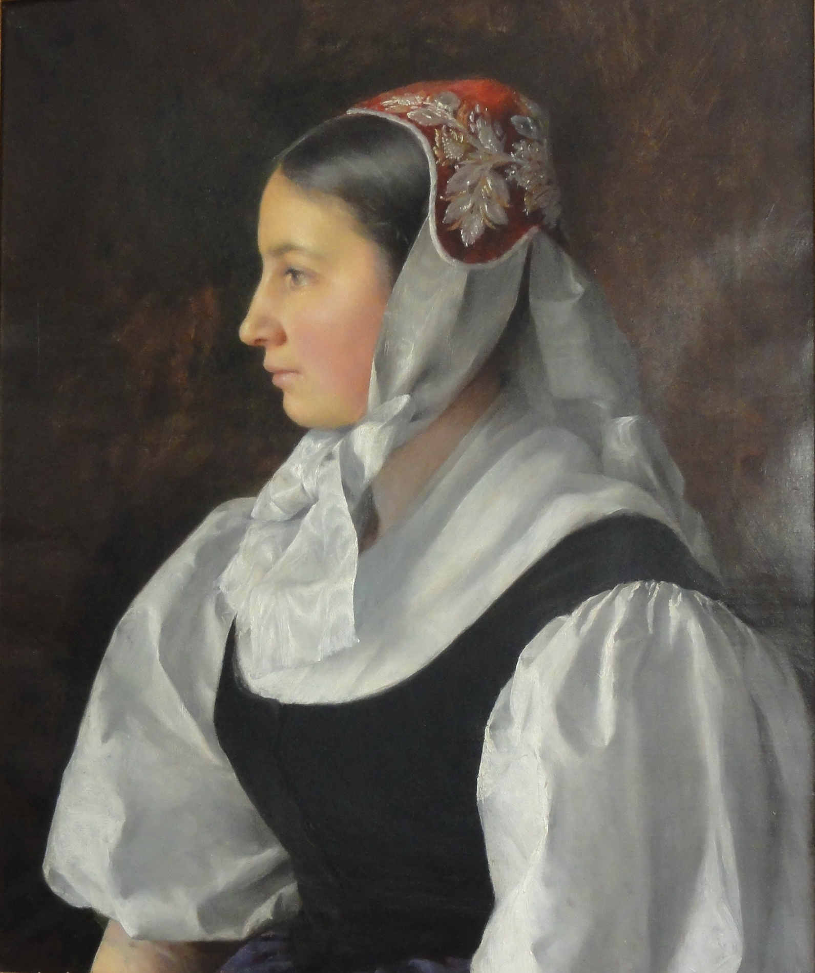 Национальная одежда женщин княжества Монбельяра